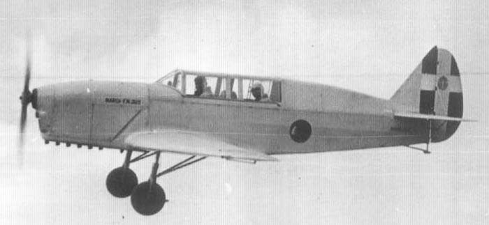 Avion Nardi FN.305A de fabricație italiană (zbor de încercare, aparatul nu este încă înmatriculat)